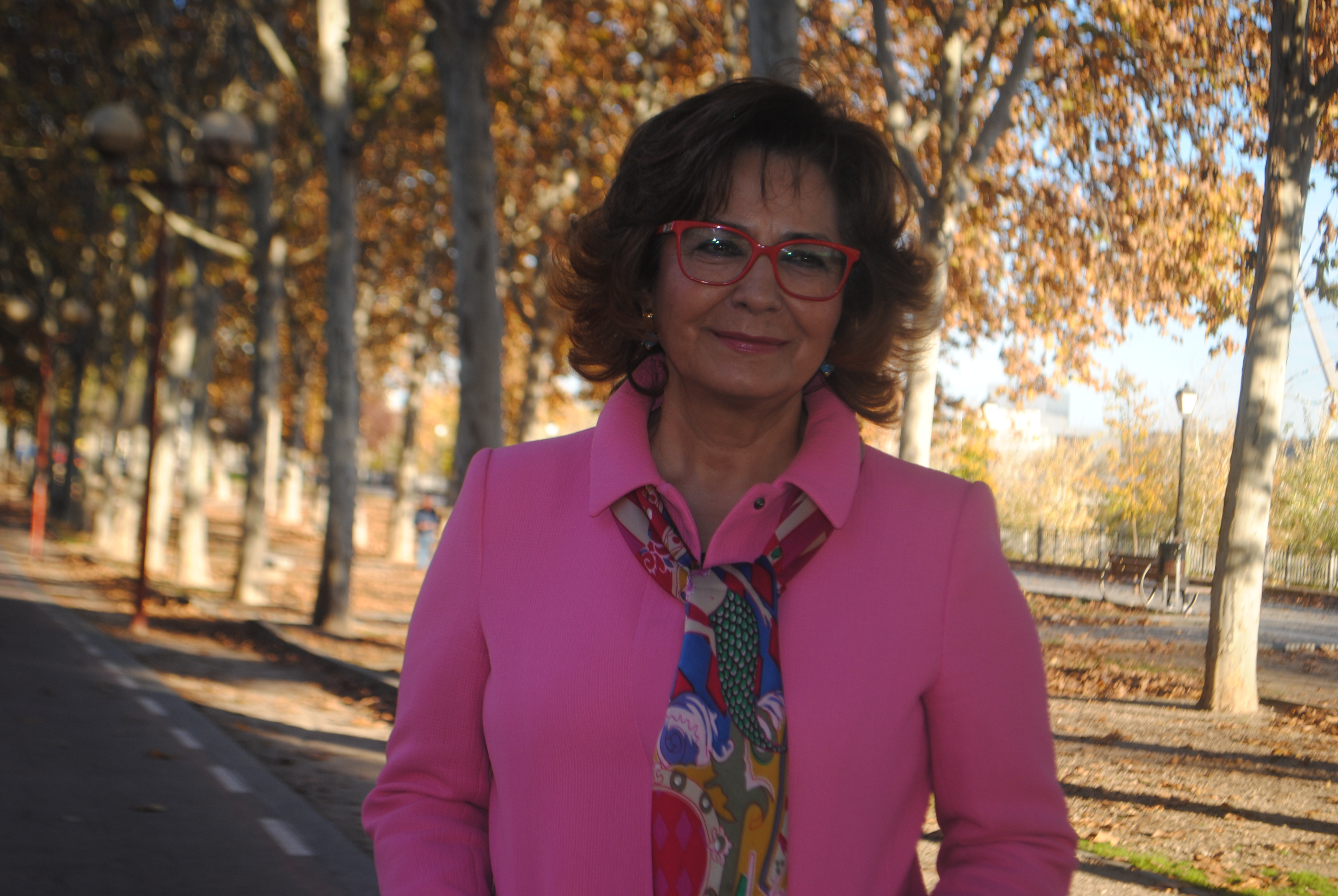 Senadora